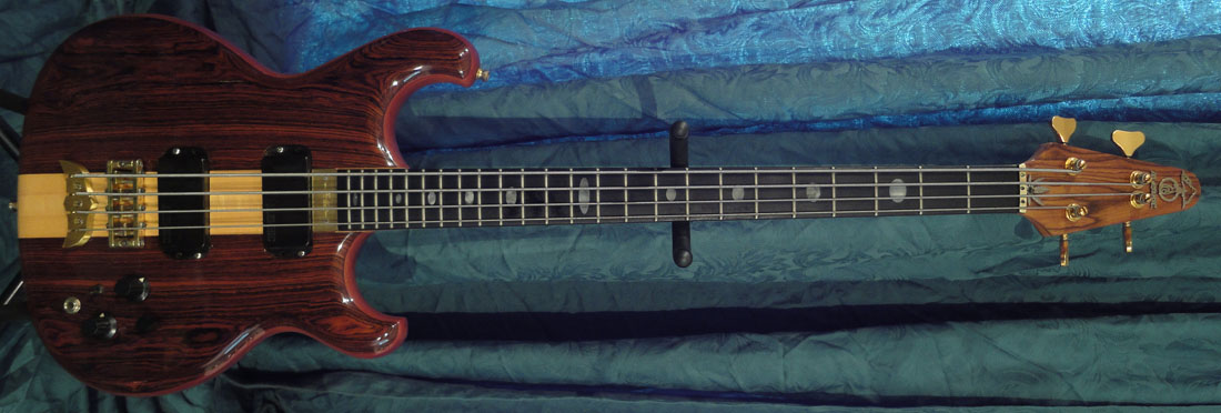 1988 Spoiler, Coco Bolo top